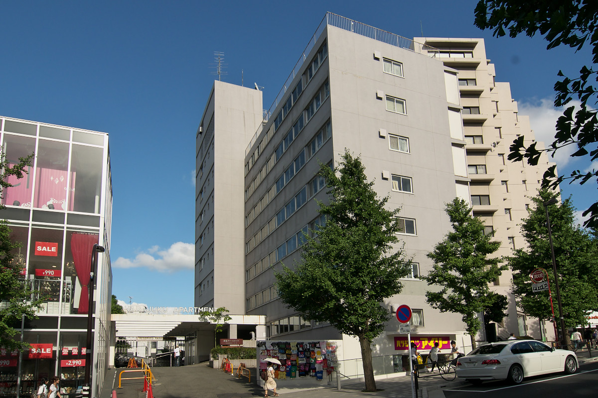 「原宿アパートメンツ」、原宿付近で最も初期に建てられた高級集合住宅。